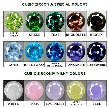 เซอร์คอเนียหลากหลายสี ขึ้นกับออกไซด์ที่ผสมใส่ตอนสังเคราะห์